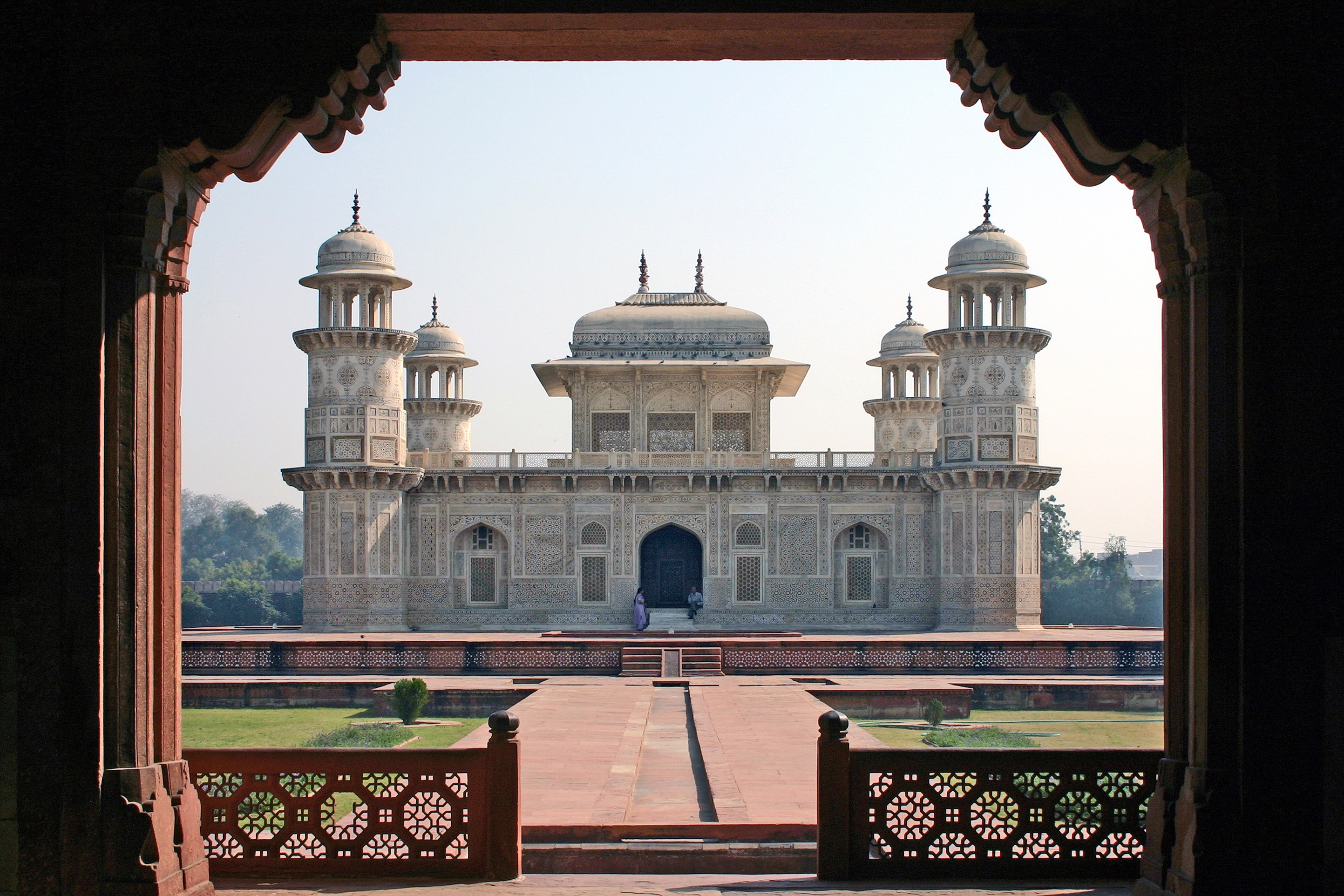 Edited Agra_Itimad-ud-Daula_1.jpg. Mausoleum des Itimad-ud-Daula, erbaut 1622-1628, in Agra / Indien